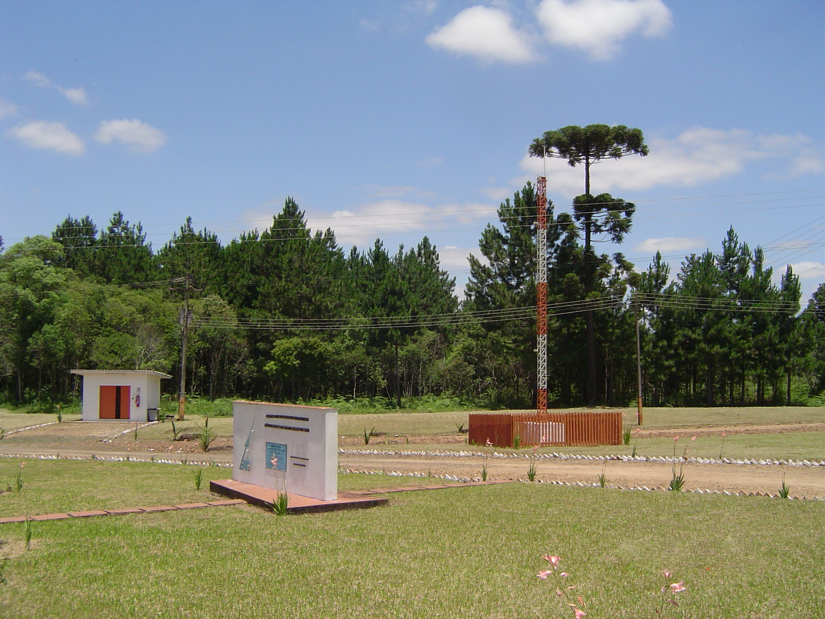 Estação meteorológica autônoma de Paula Freitas